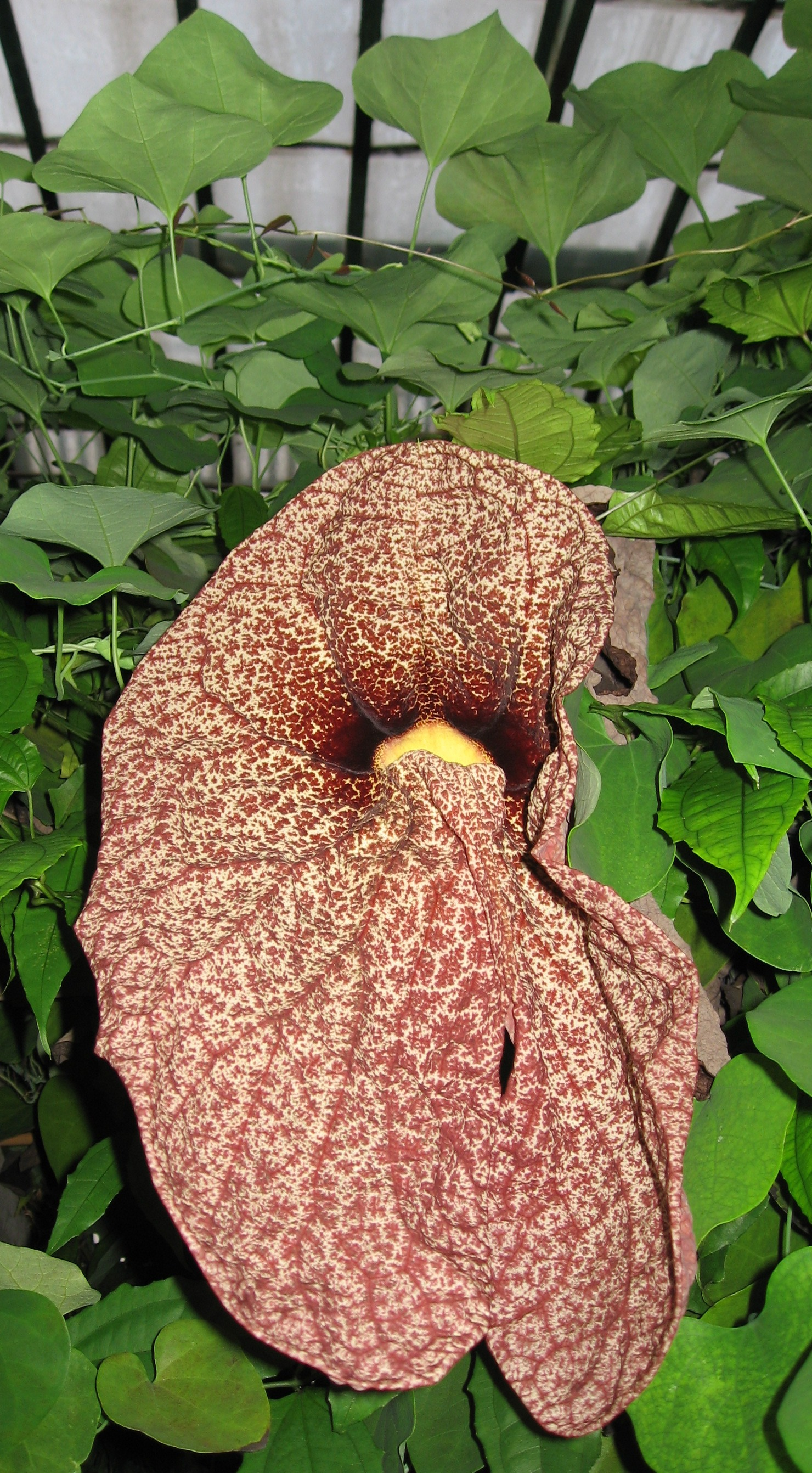 Aristolochia gigantea in Serres d'Auteuil